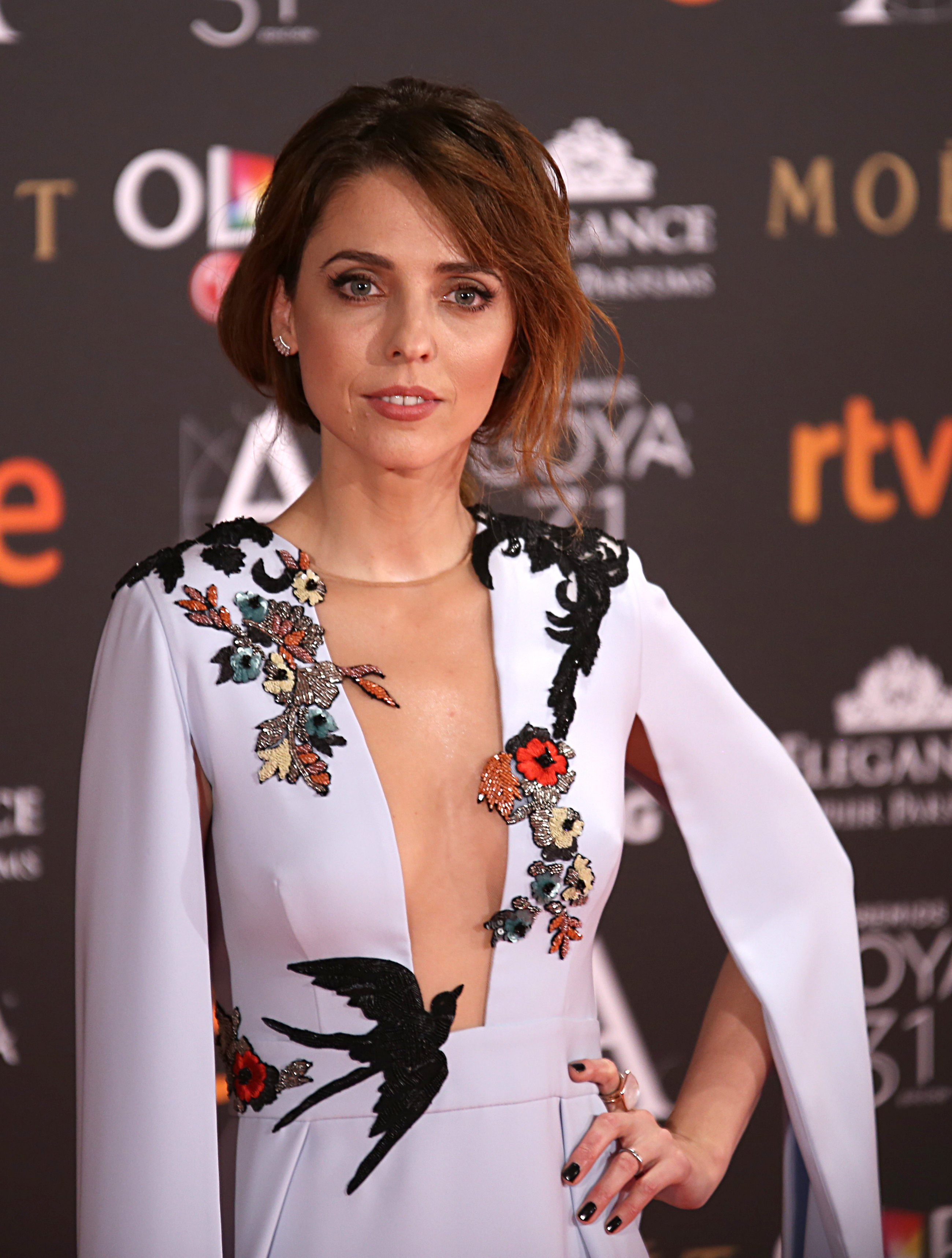 Leticia Dolera en los Premios Goya 2017.